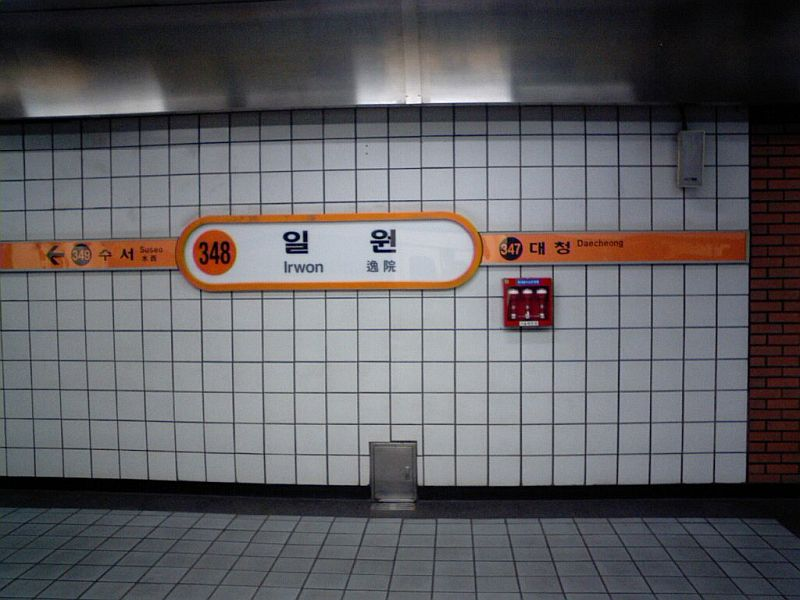 ソウル地下鉄3号線逸院駅